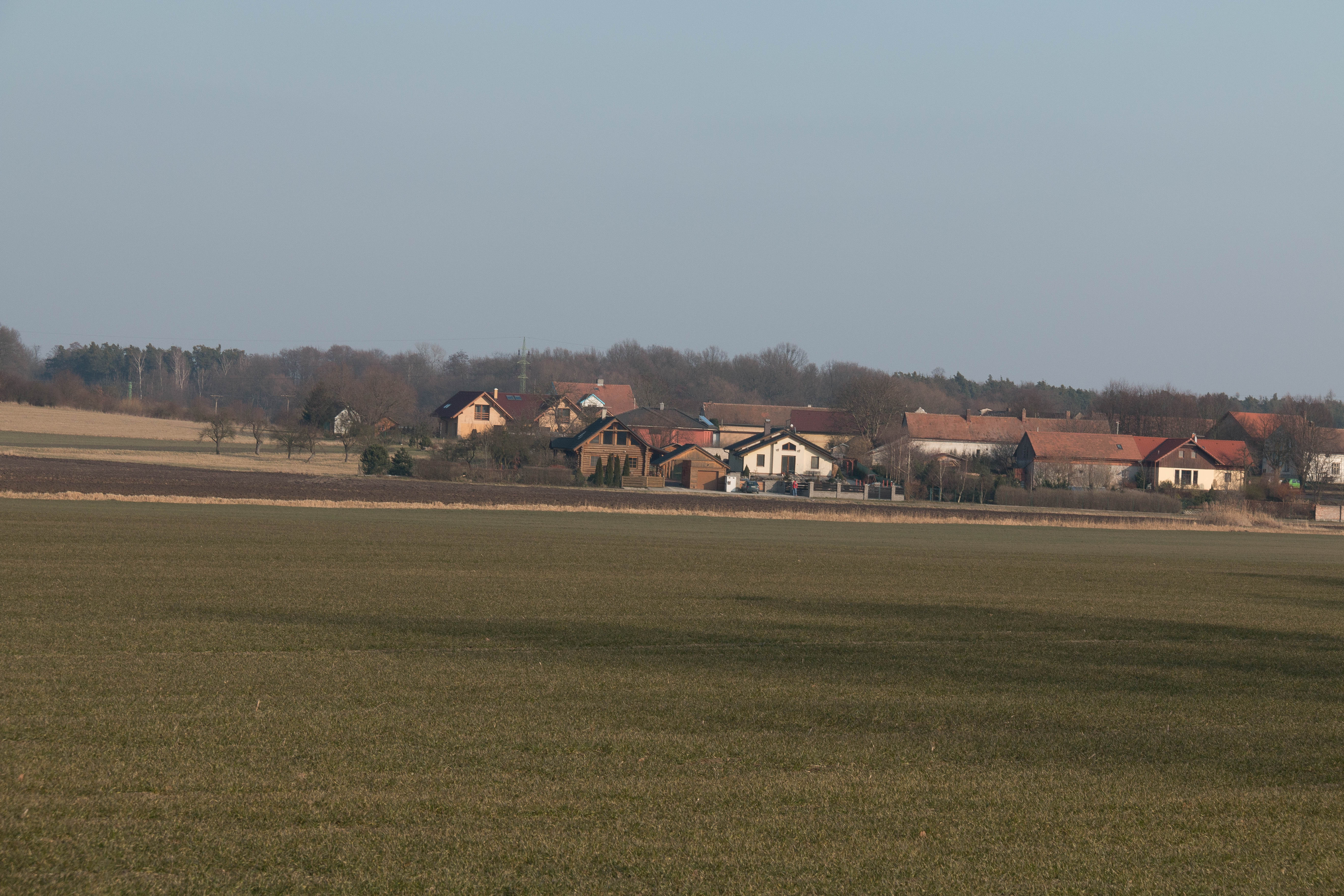 Pohled na Neratov